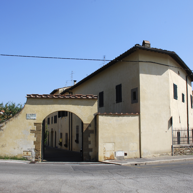 Villa Carducci di Legnaia or Villa Carducci-Pandolfini, Florence, Italy - contains "Il ciclo degli uomini e donne illustri" (around 1455), frescos by Andrea del Castagno).